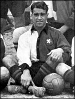 Extrato de uma foto da equipa do Sporting em 1907